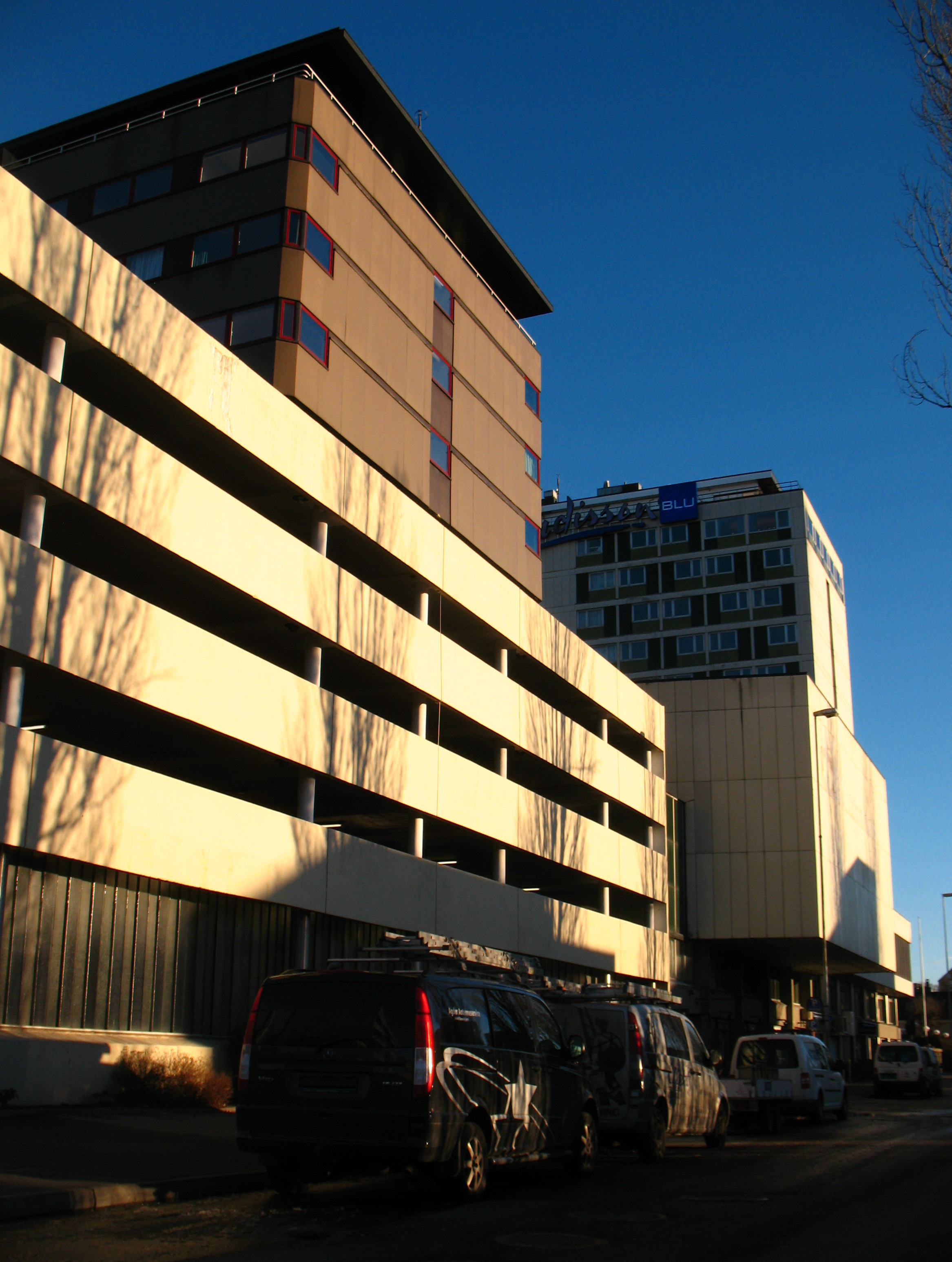 Caledonien hotell i Vestre Strandgate 7 i Kristiansand fra nordvest.